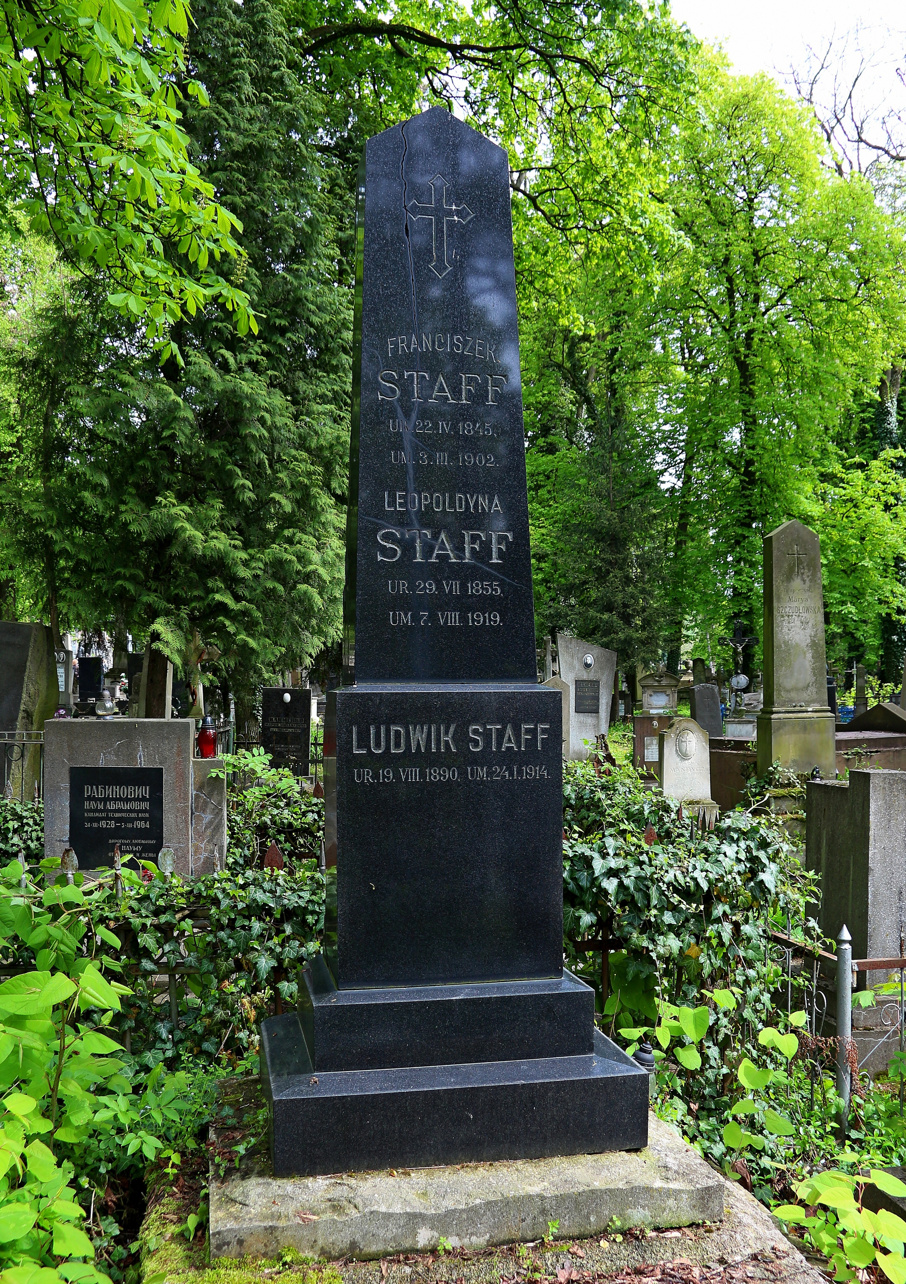 Гробниця родини Стафф. Личаківський цвинтар ,поле 54.